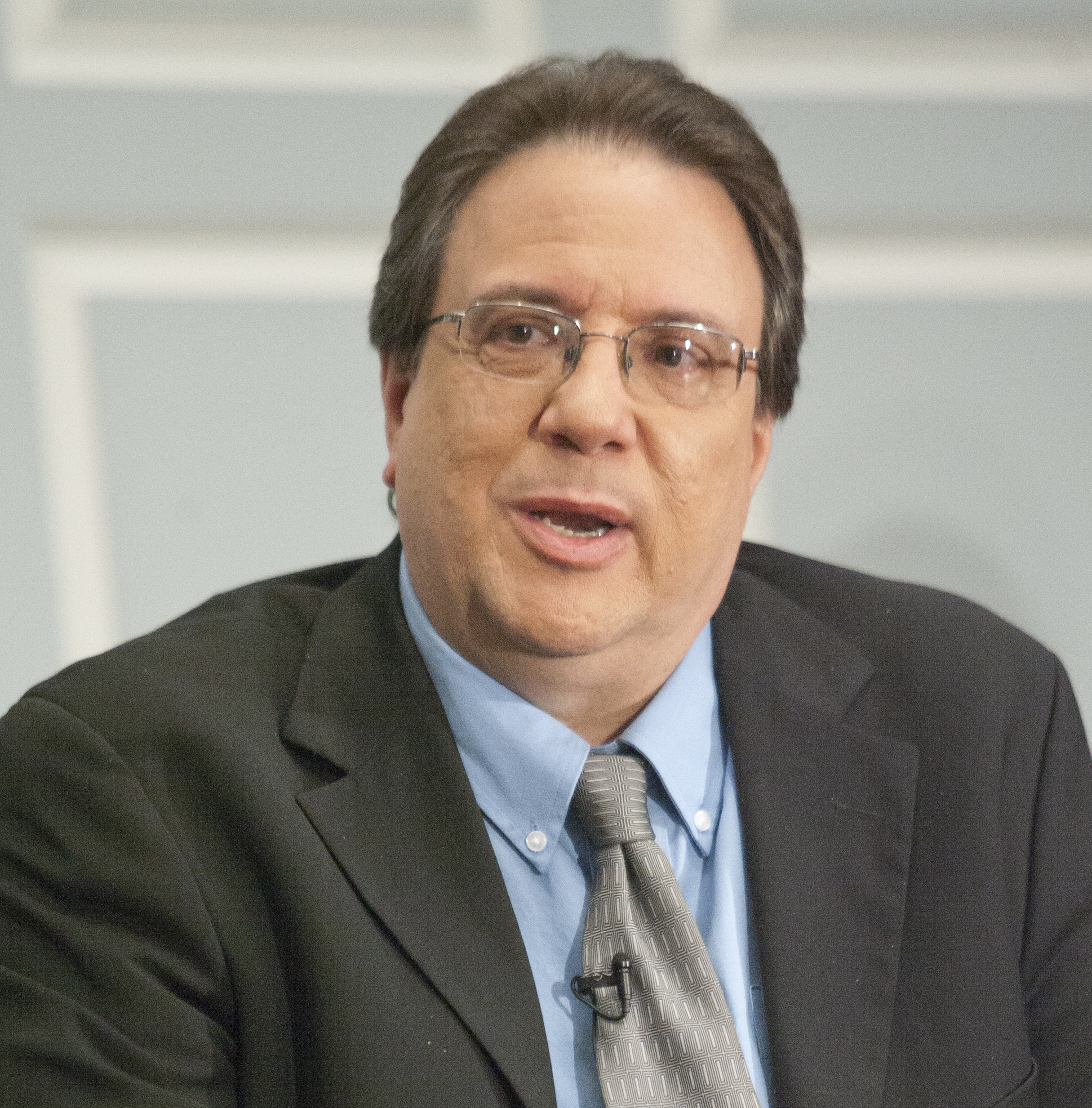 RS3J3457